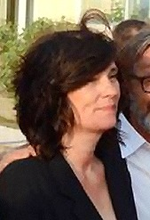 Catherine Corsini au festival du film de Cabourg